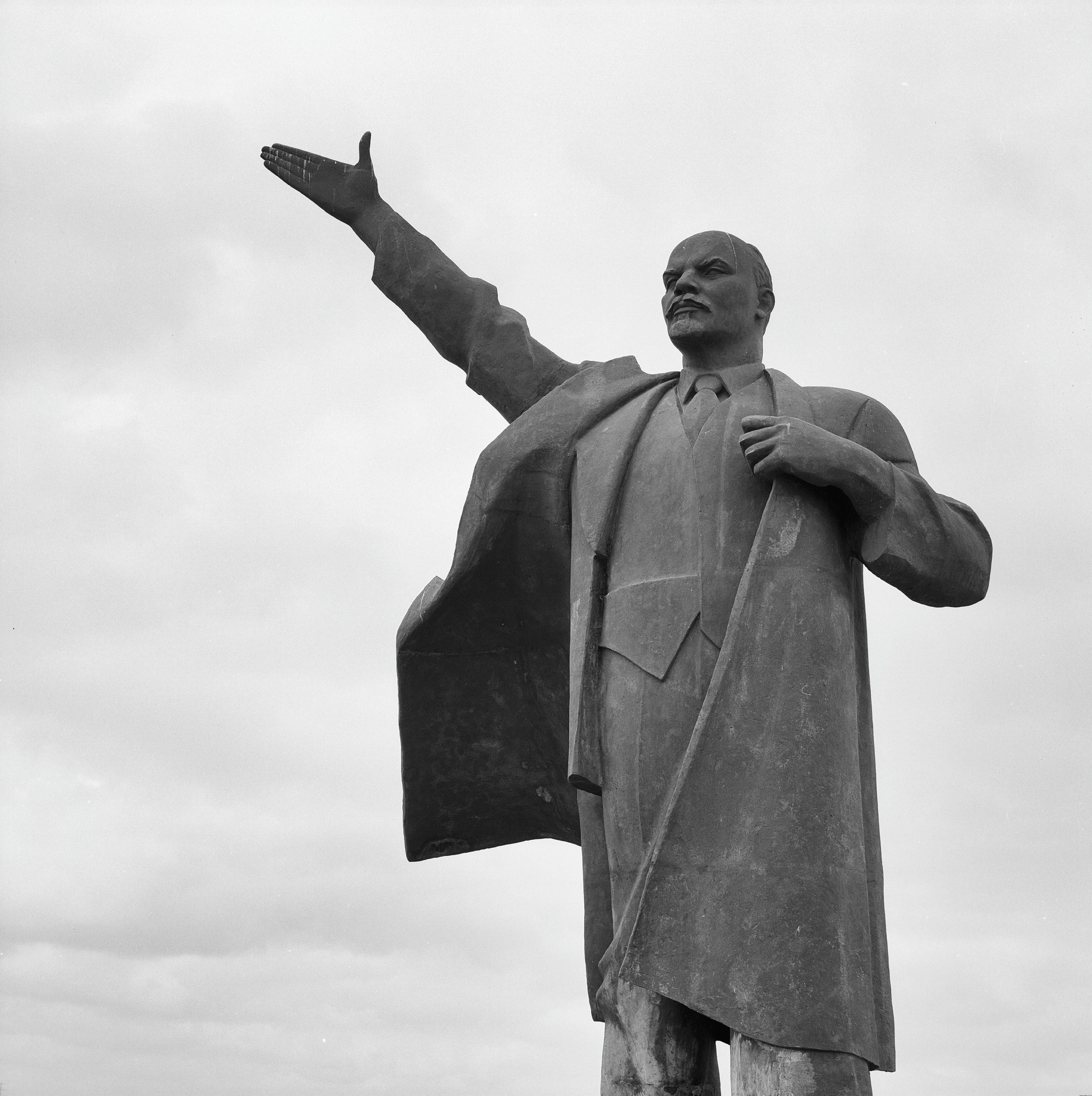 Standbeeld/ Beeld: Aanzicht Leninbeeld vanaf zijn middel (opmerking: Gefotografeerd voor Monumenten In Nederland Groningen)